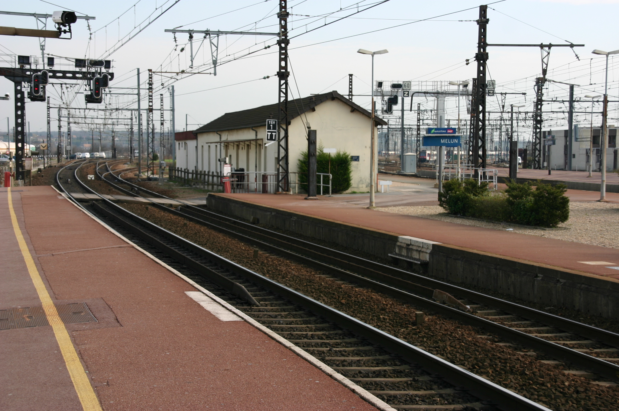 La gare de Melun, Melun, département de la Seine-et-Marne (France)